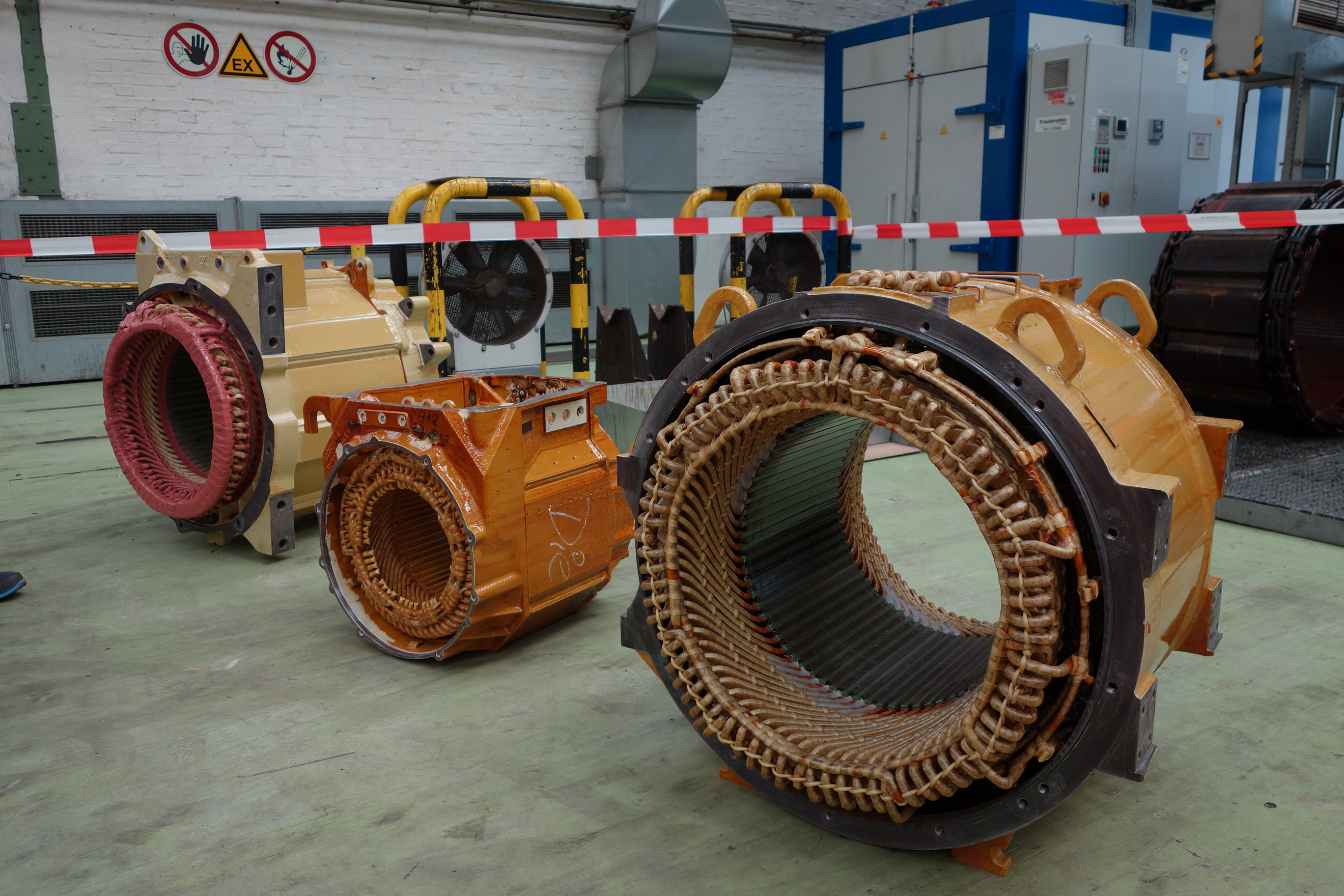 DB Fahrzeuginstandhaltung Werk Dessau, Tag der offenen Tür, verschiedene Statoren von Fahrmotoren